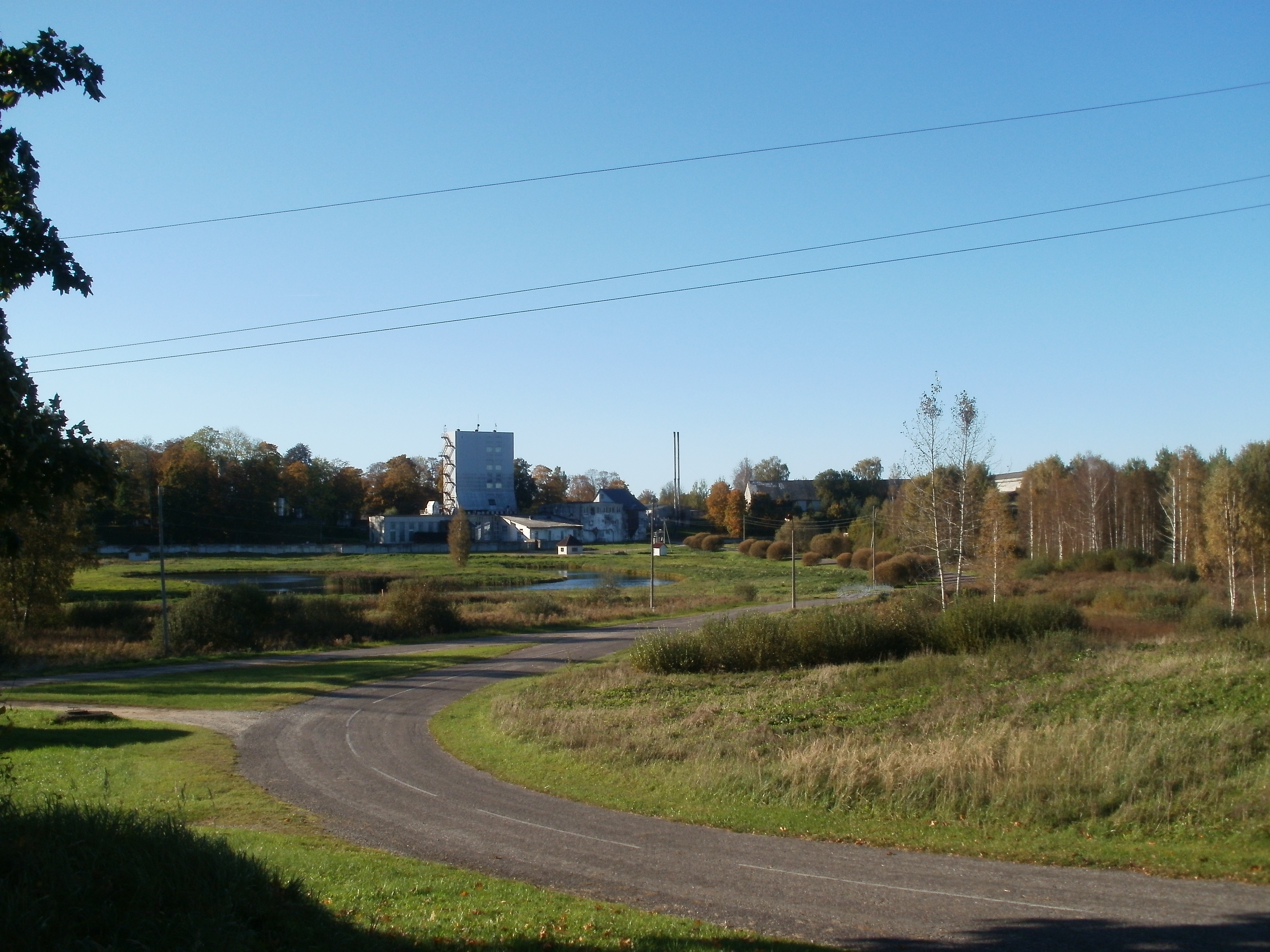 Ražotne Jaunpagastā